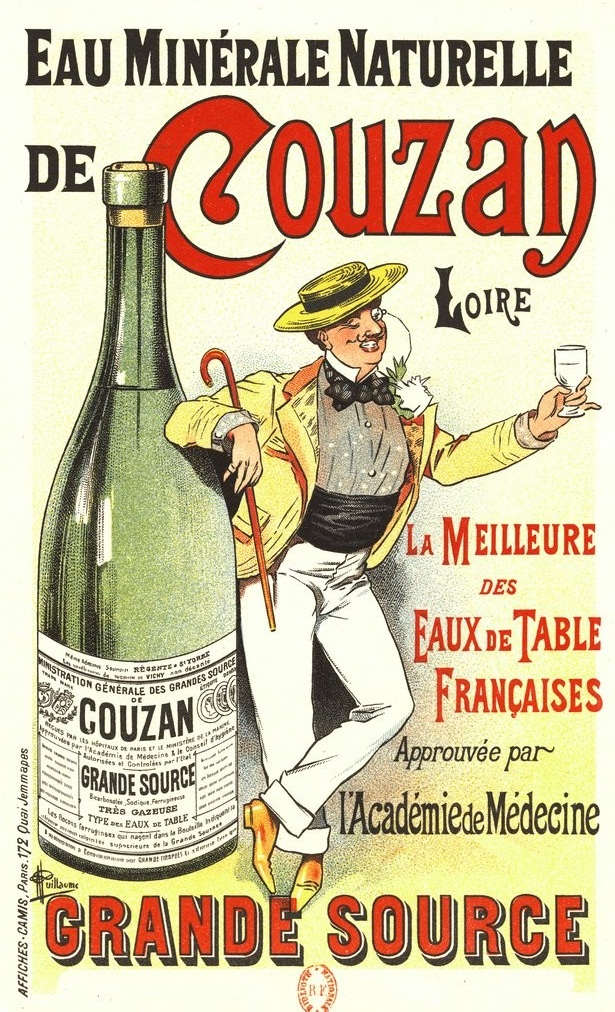 Lithographic poster for Eau minérale naturelle de Couzan by Albert Guillaume, printed by Camis, Paris.